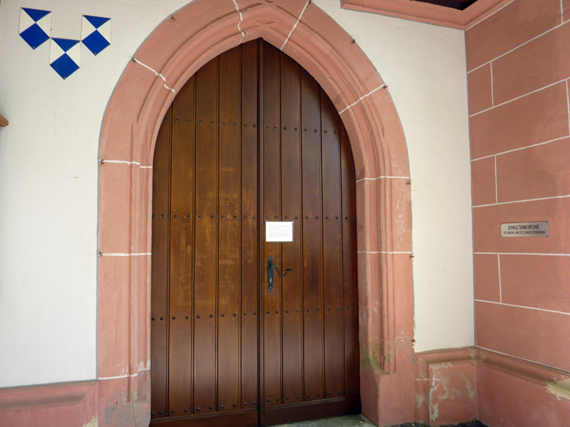 Eingangsportal der Simultankirche Bechtolsheim, Sonderschutzzeichen.